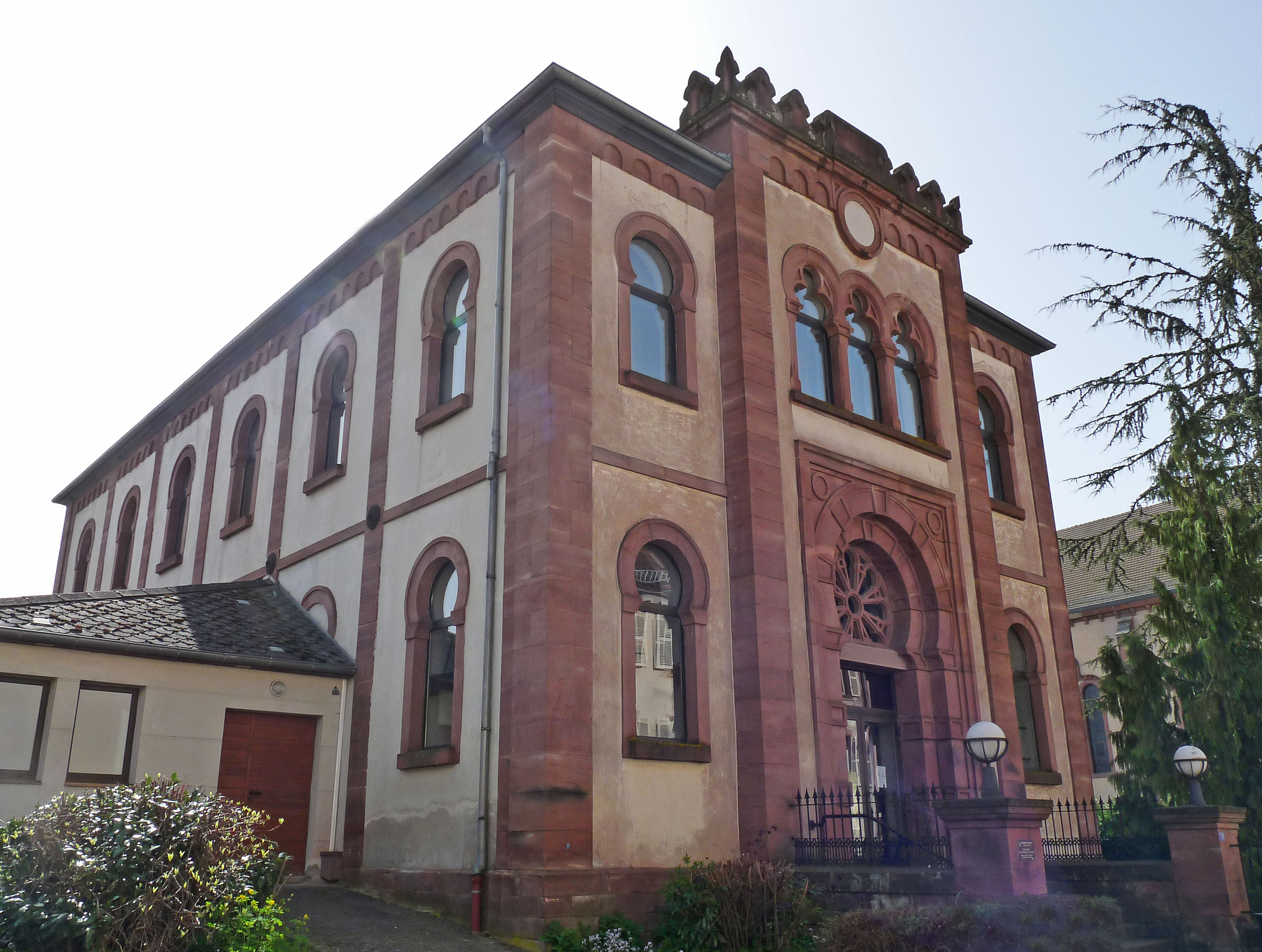 Ancienne synagogue de Niederbronn (Bas-Rhin). Terminée en 1869. Actuellement Foyer paroissial catholique. Inscrite à l'inventaire des monuments historiques.